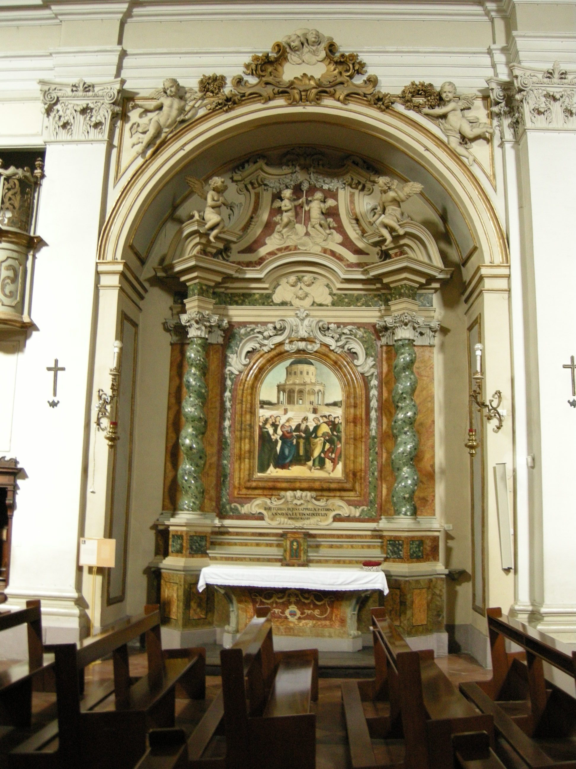 Città di castello, san francesco, interno 06 cappella sposalizio della vergine di raffaello